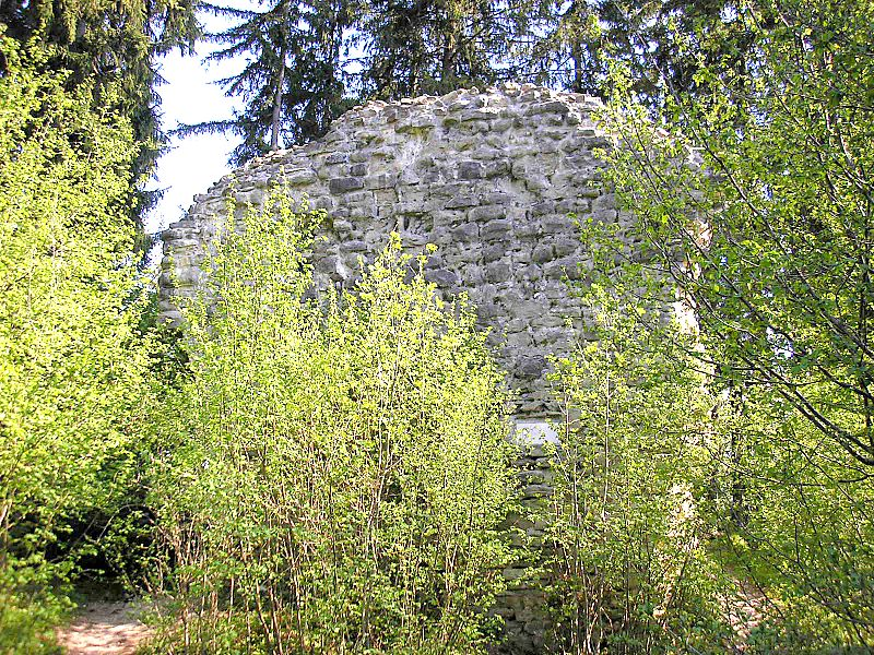 Burg Neuenburg bei Durach (Landkreis Oberallgäu, Bayerisch-Schwaben). Der Bergfried von Südwesten. Eigene Aufnahme, Mai 2008 / Neuenburg castle near Durach (Landkreis Oberallgäu, Bavaria, Germany). The keep from the south west. Own photo, May 2008